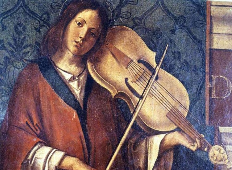 detail